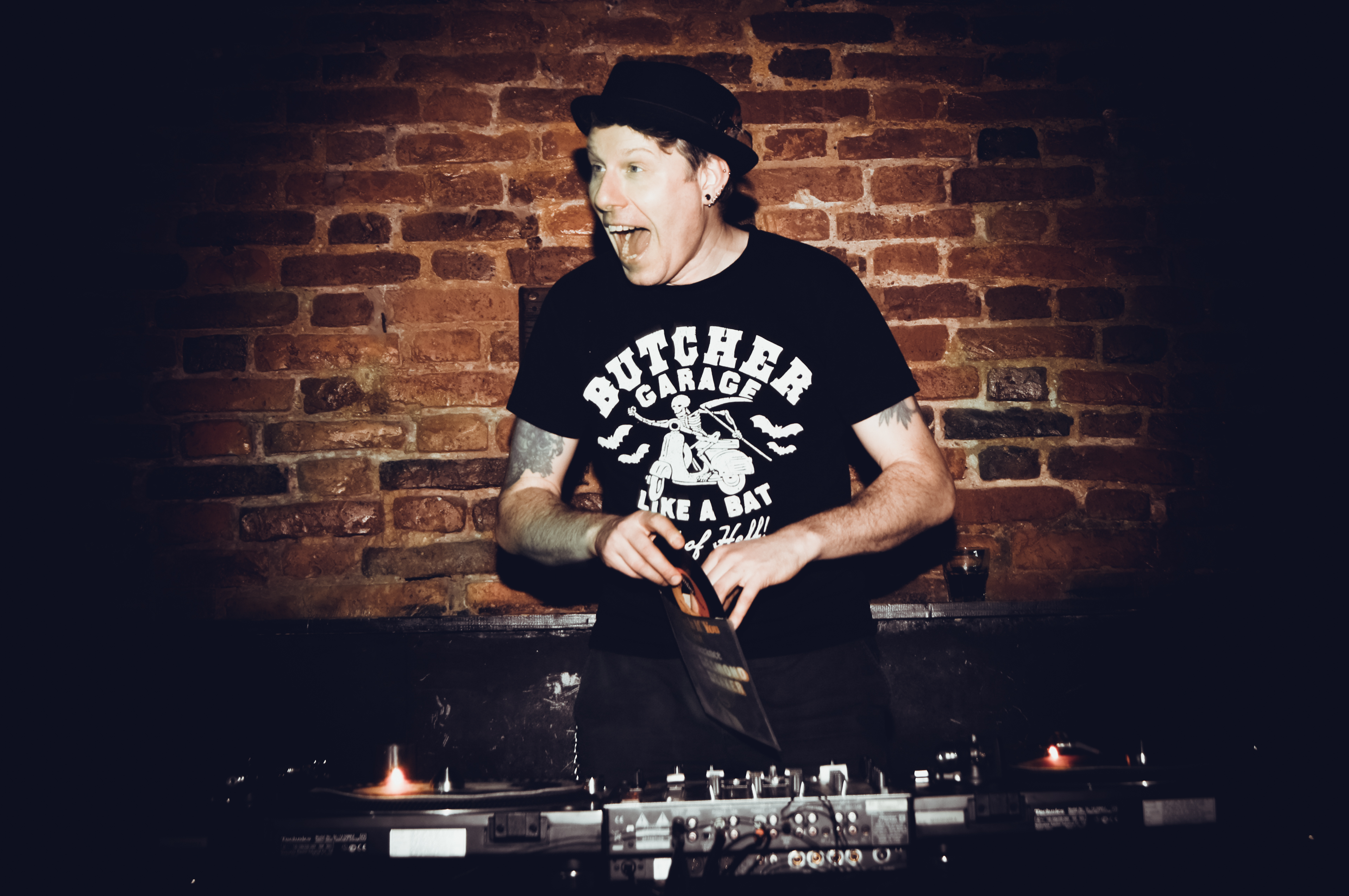 Dj-сет перед Большим весенним концертом St.Petersburg Ska-Jazz Review 6 апреля 2018